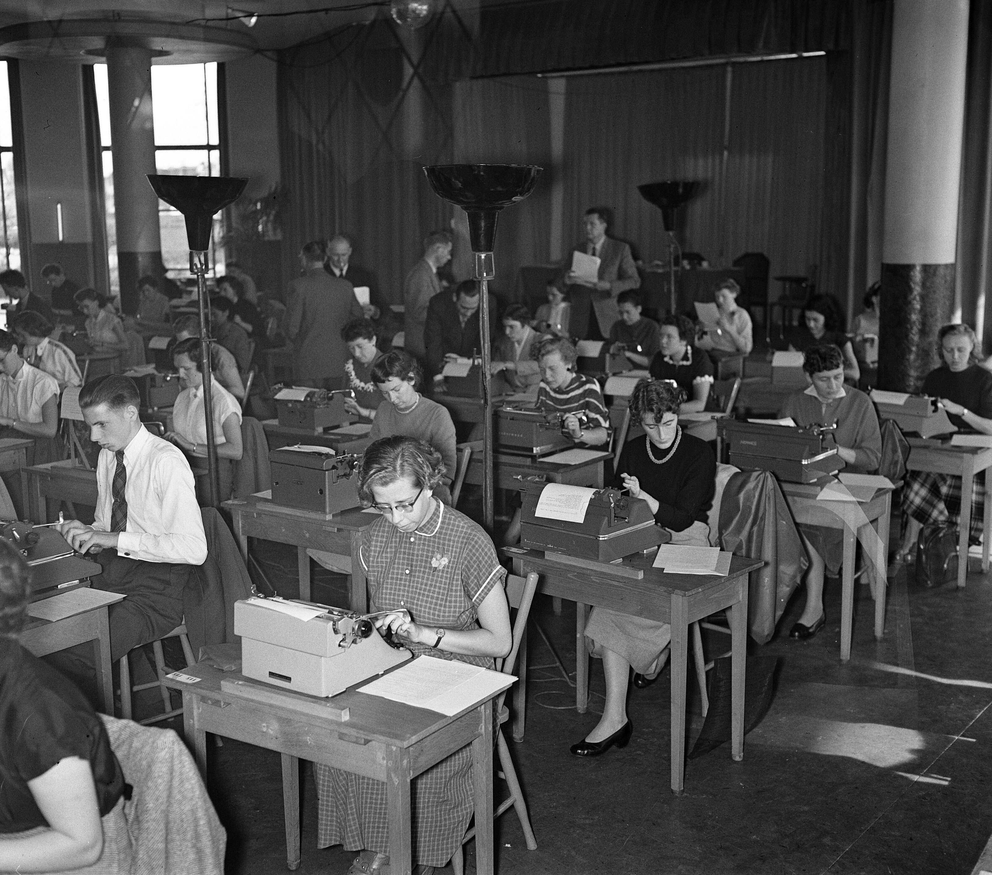 Collectie / Archief : Fotocollectie Anefo Reportage / Serie : [ onbekend ] Beschrijving : Nationale kampioenschap typen in Den Haag Datum : 25 september 1954 Locatie : Den Haag, Zuid-Holland Trefwoorden : typen, typisten, typistes, wedstrijden Fotograaf : Rossem, Wim van / Anefo Auteursrechthebbende : Nationaal Archief Materiaalsoort : Glasnegatief Nummer archiefinventaris : bekijk toegang 2.24.01.09 Bestanddeelnummer : 906-7444